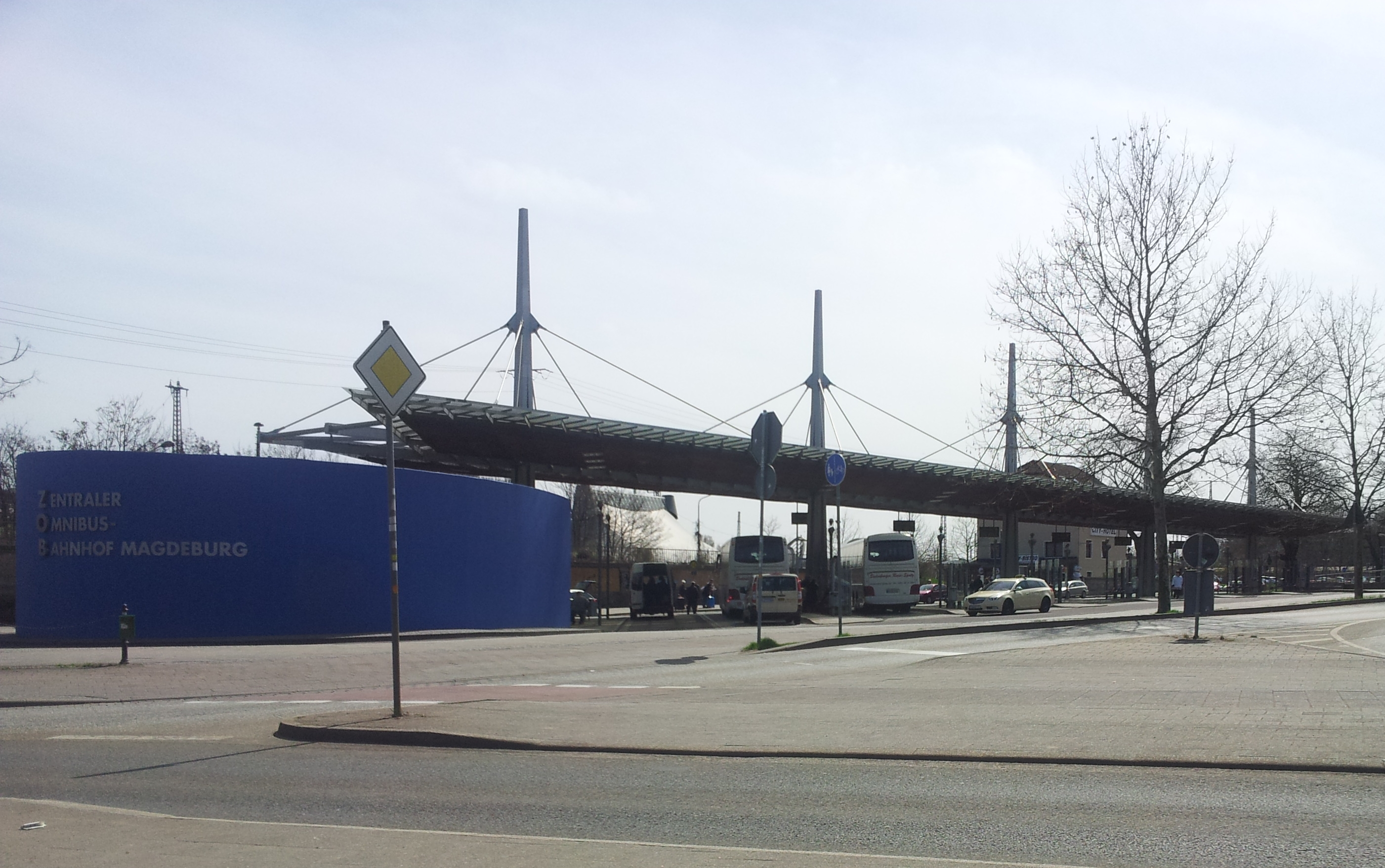 Zentraler Omnibusbahnhof Magdeburg, Deutschland